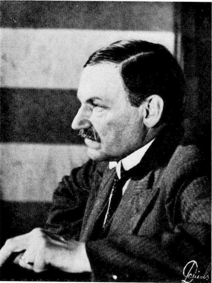 Edvin Kallstenius (1881–1967), svensk tonsättare, musikkritiker och radioman.